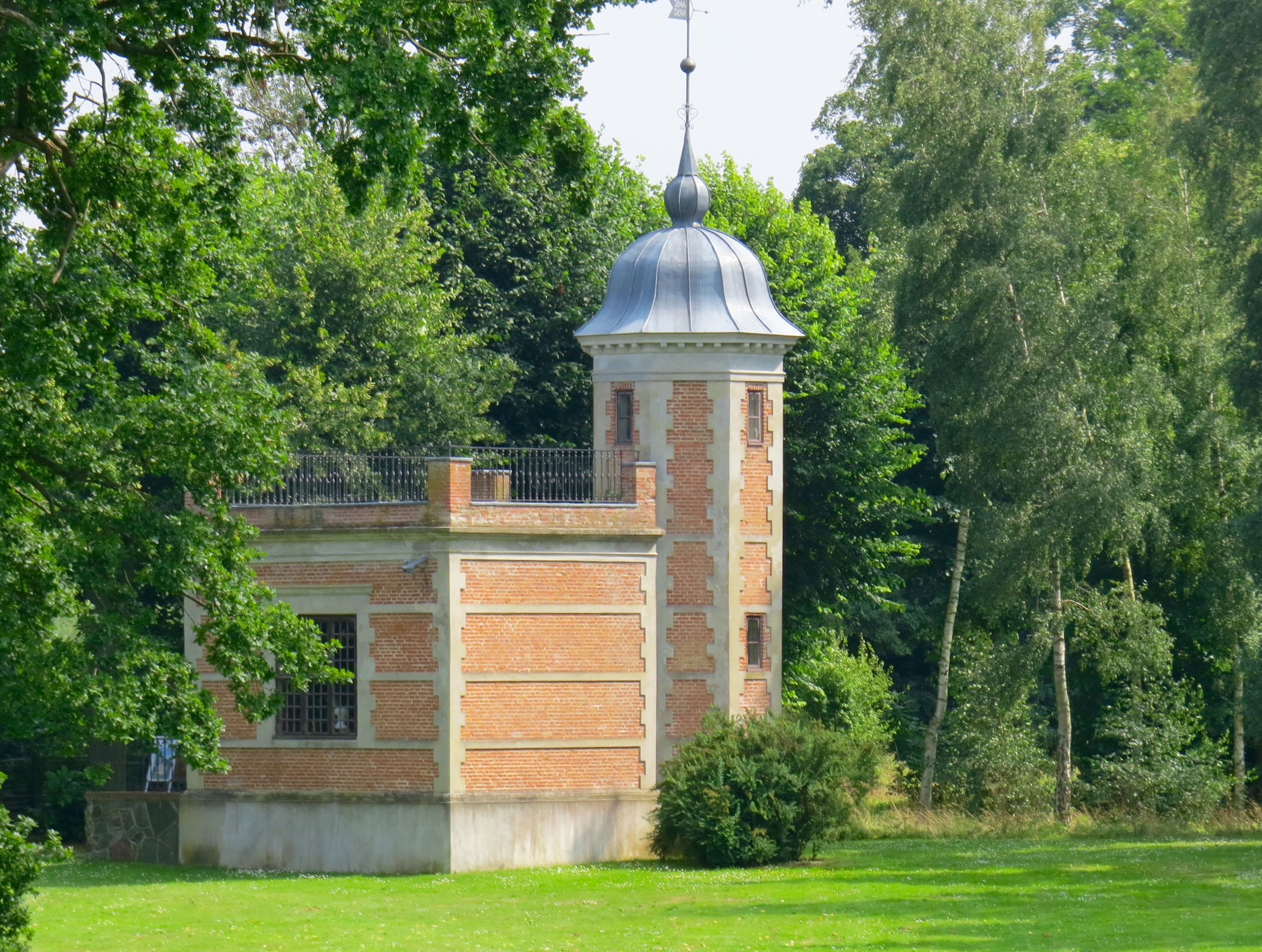 N.F.S. Grundtvigs skrivepavillon «Venligheden» I Rønnebæksholms have, Sjælland